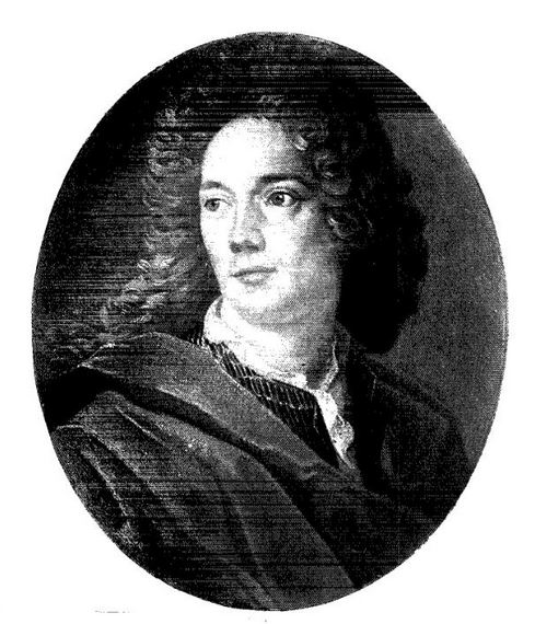 Portrait de Jean de La Bruyère